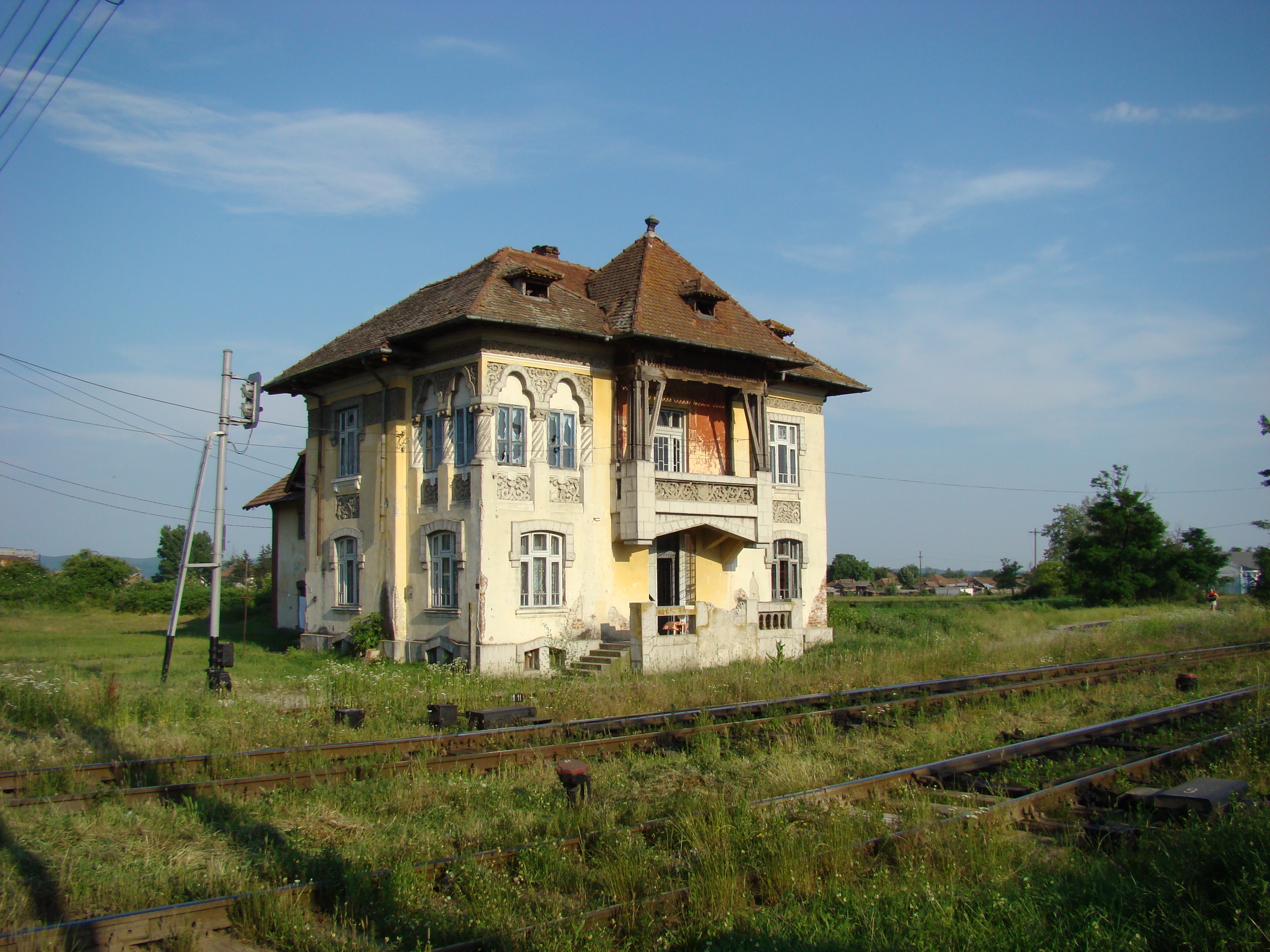 Băbeni, Vâlcea